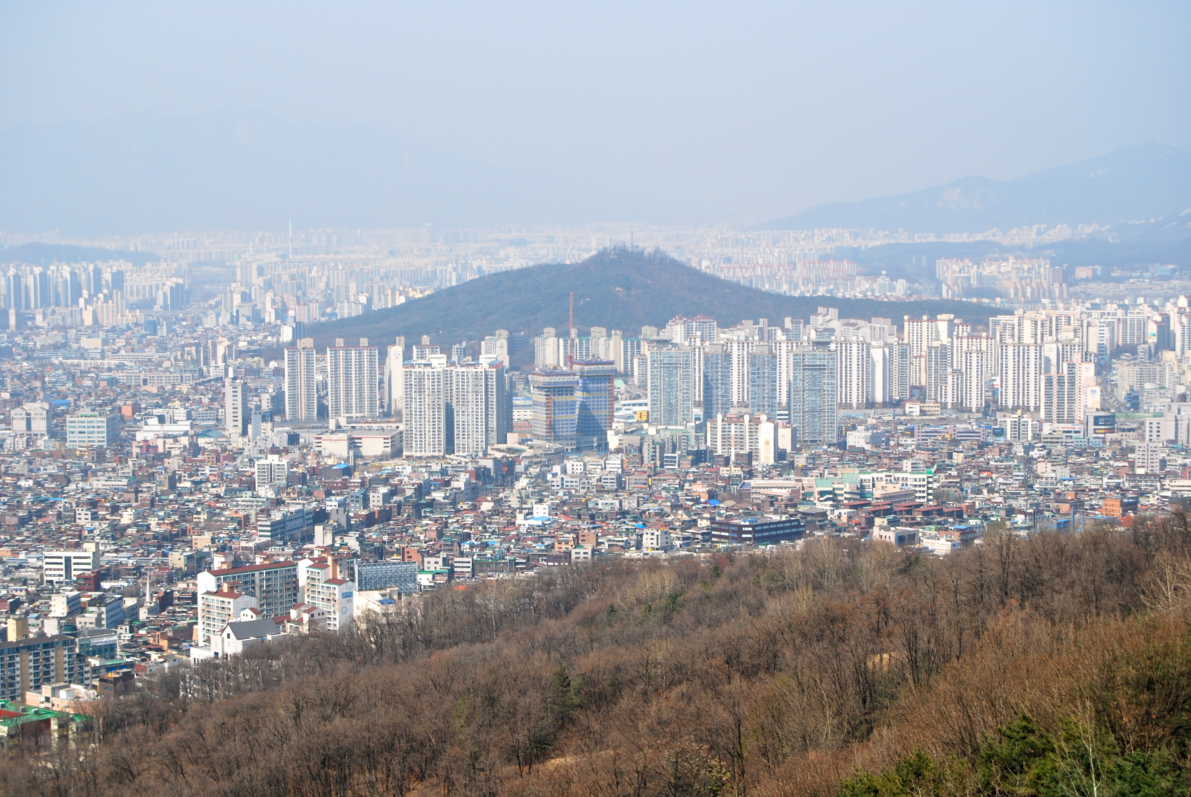 guri 2009 korea